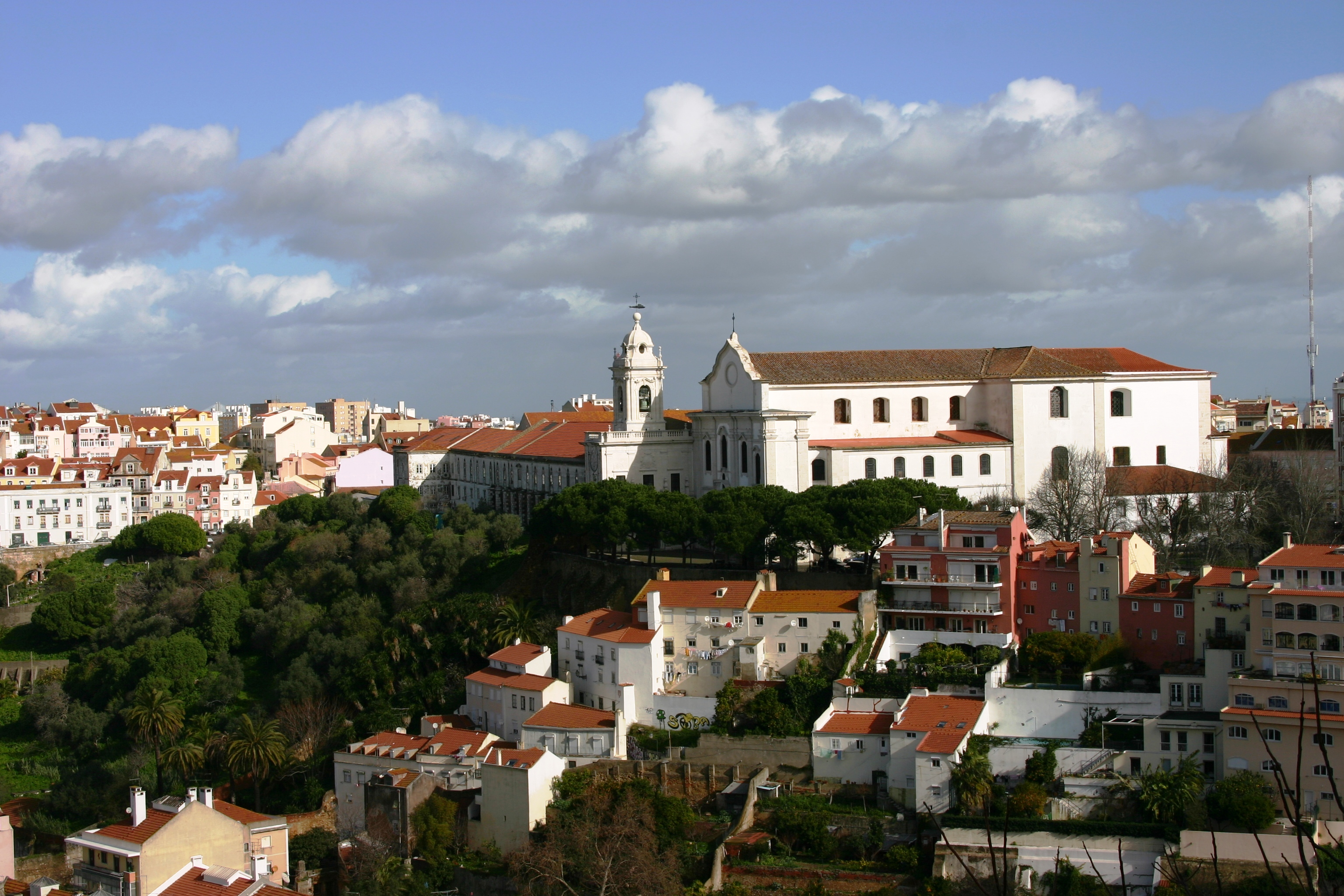 Vista de Lisboa a partir do Castelo de São Jorge - Igreja e convento da Graça